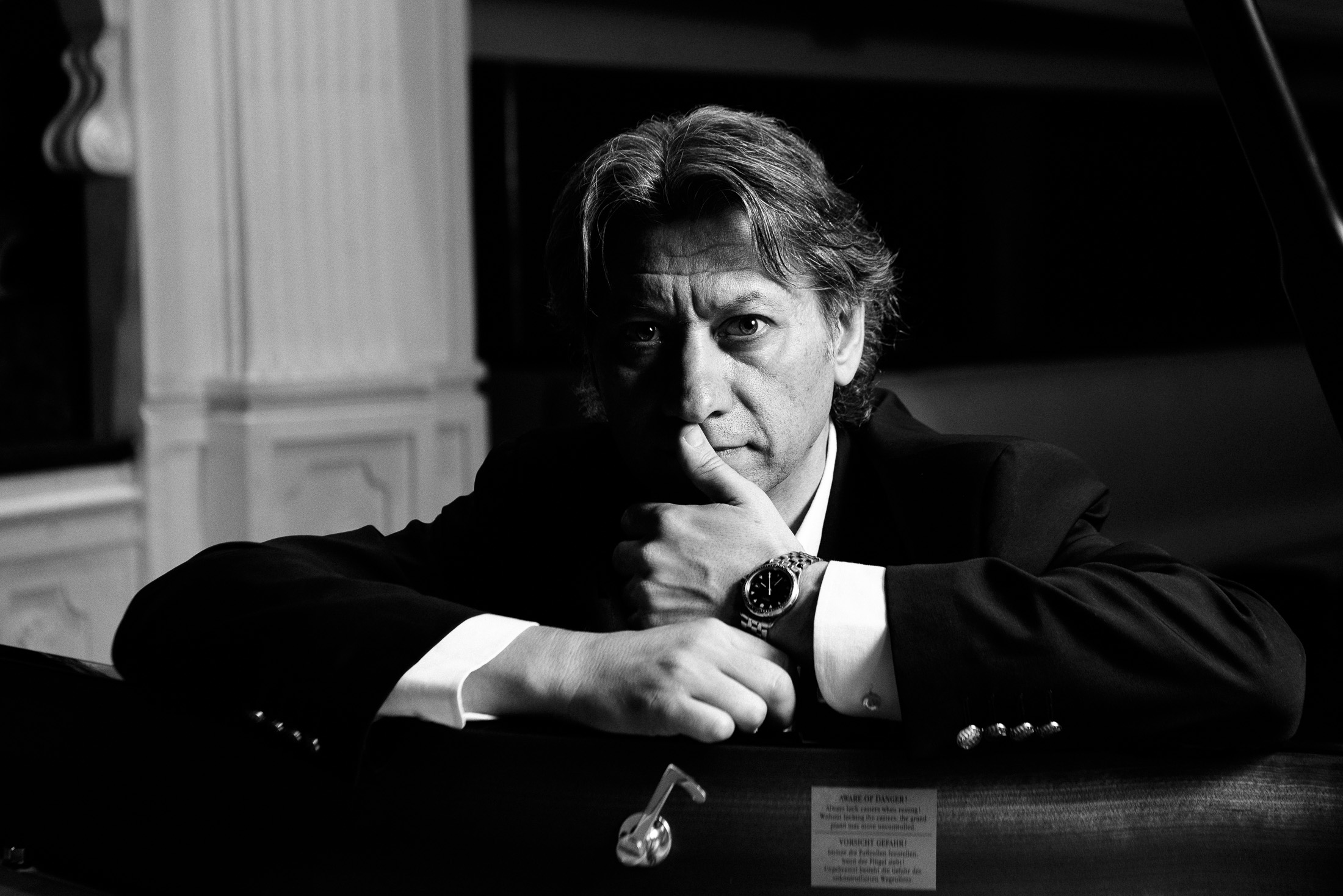 Fotografía cedida por Javier Berardini / 2014